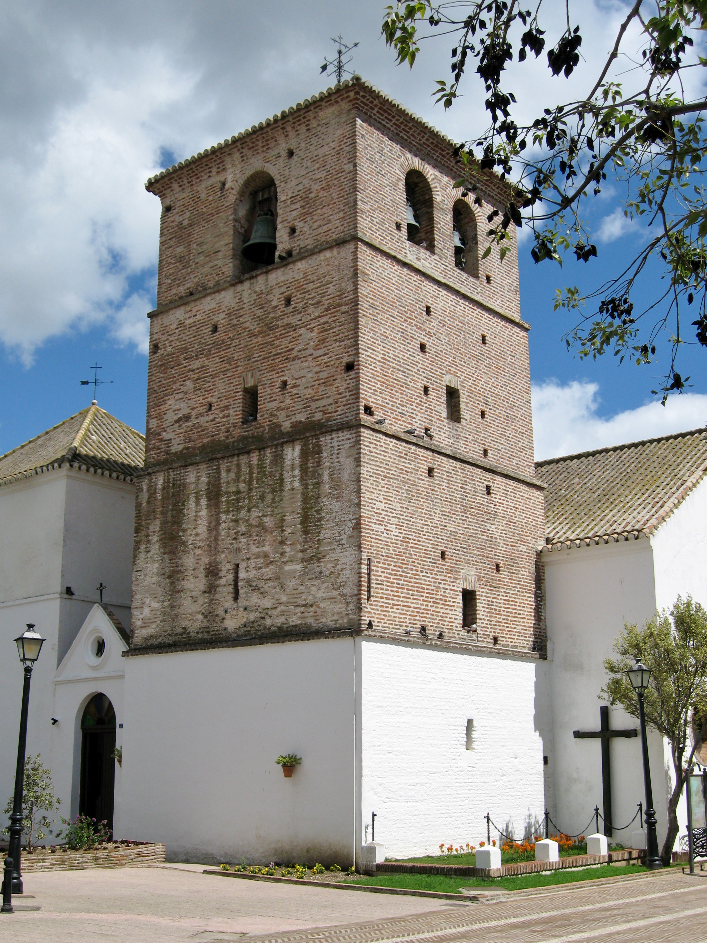 Kirche der unbefleckten Empfängnis (Parroquia de la Inmaculada Concepción), Mijas, Provinz Málaga, Andalusien, Spanien